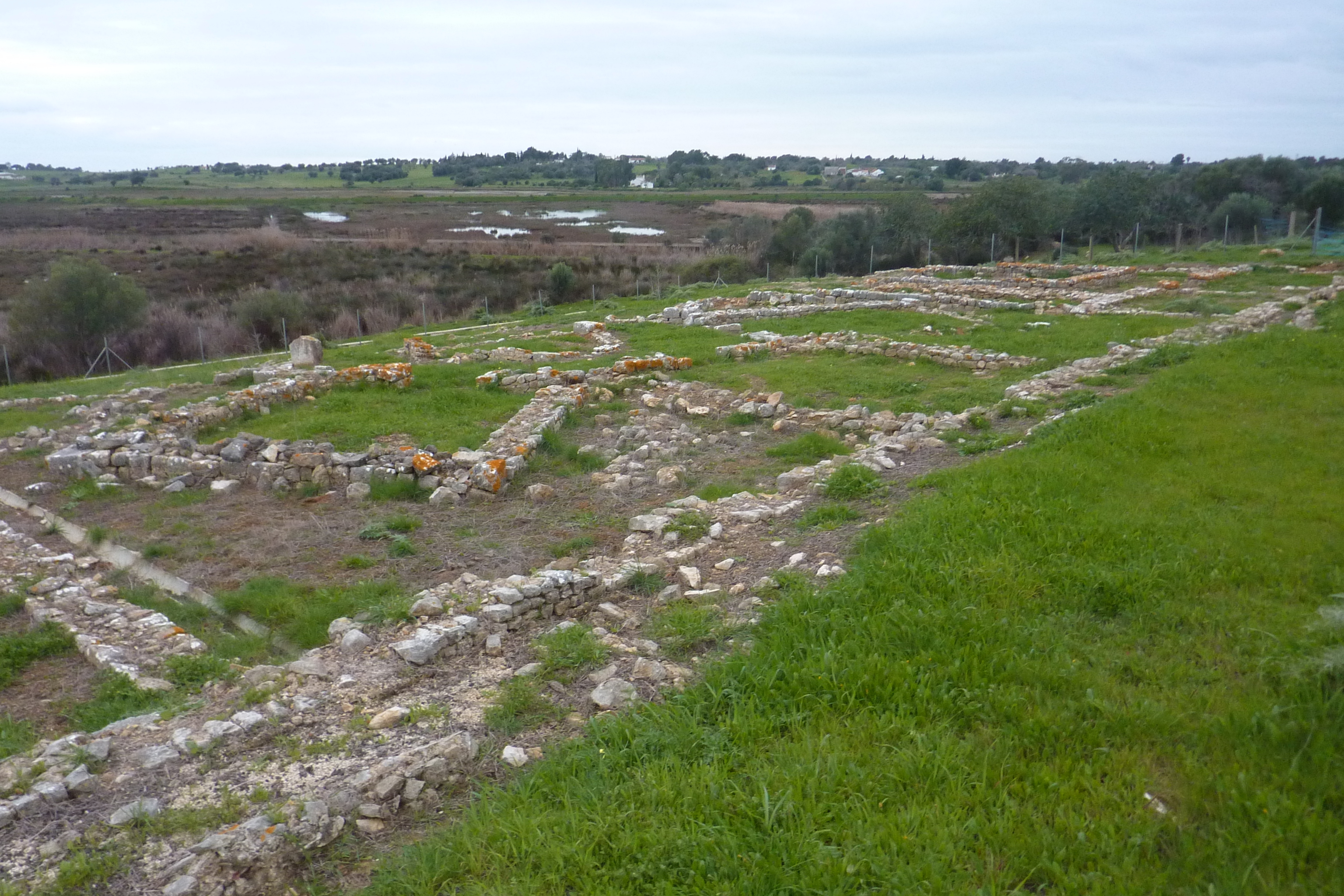 Portugal - Algarve - Abicada, roman Villa